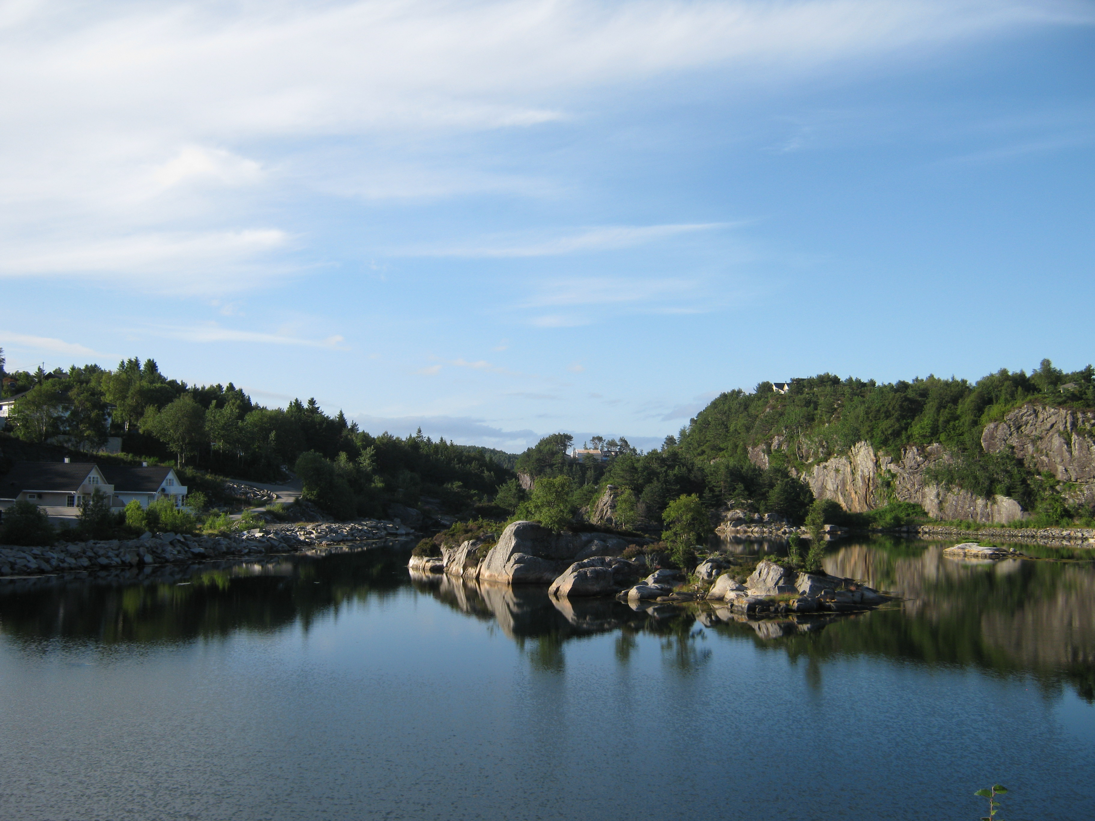 Steinseidet på Askøy.